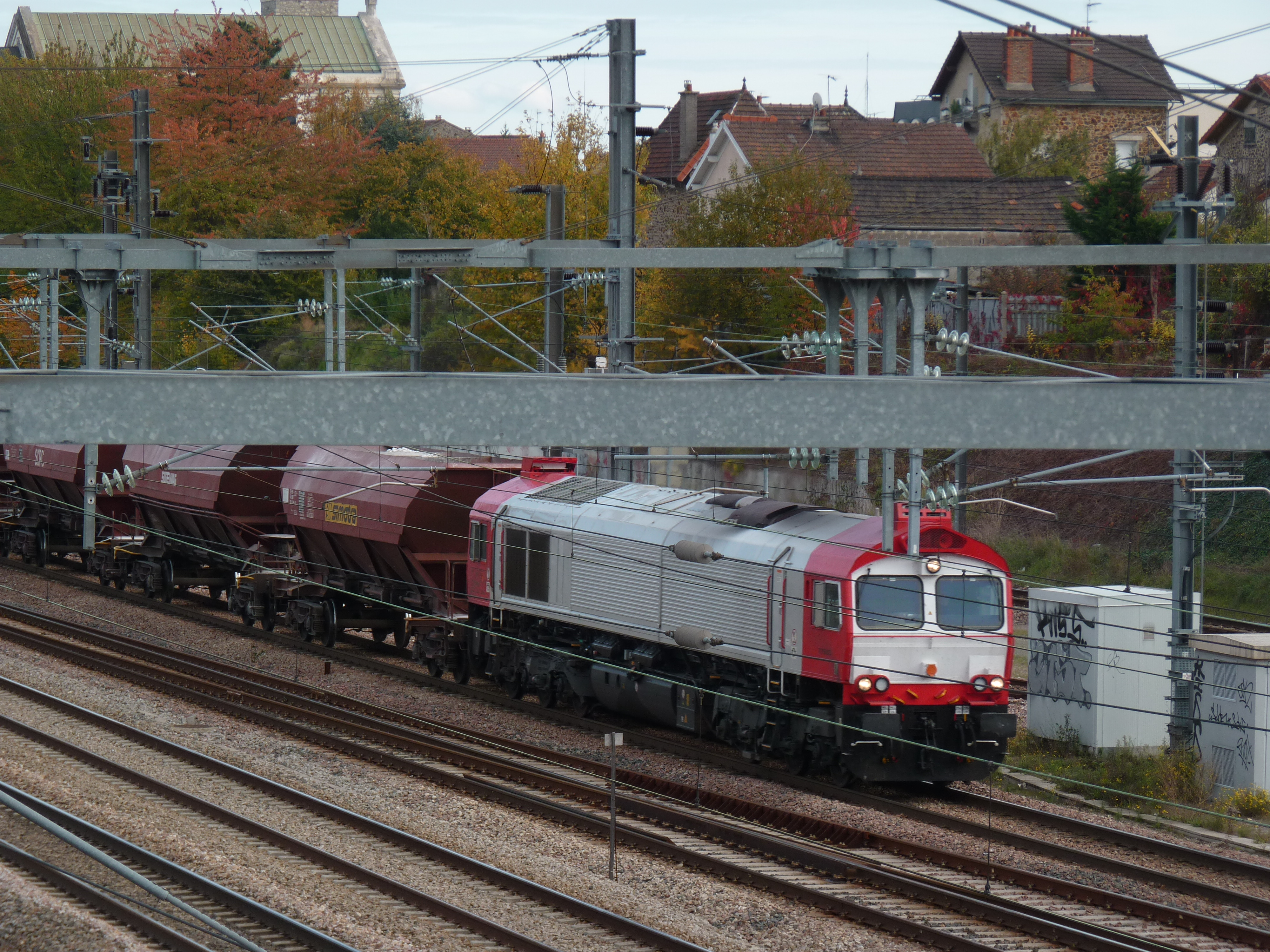 Une locomotive Classe 77 de [VFLI] traversant la gare de Vaires - Torcy en direction de Paris.